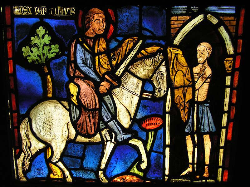 Vitrail hôtel de Cluny Paris musée national du Moyen âge, représentant St Martin (à cheval) coupant son manteau pour en donner la moitié à un pauvre.